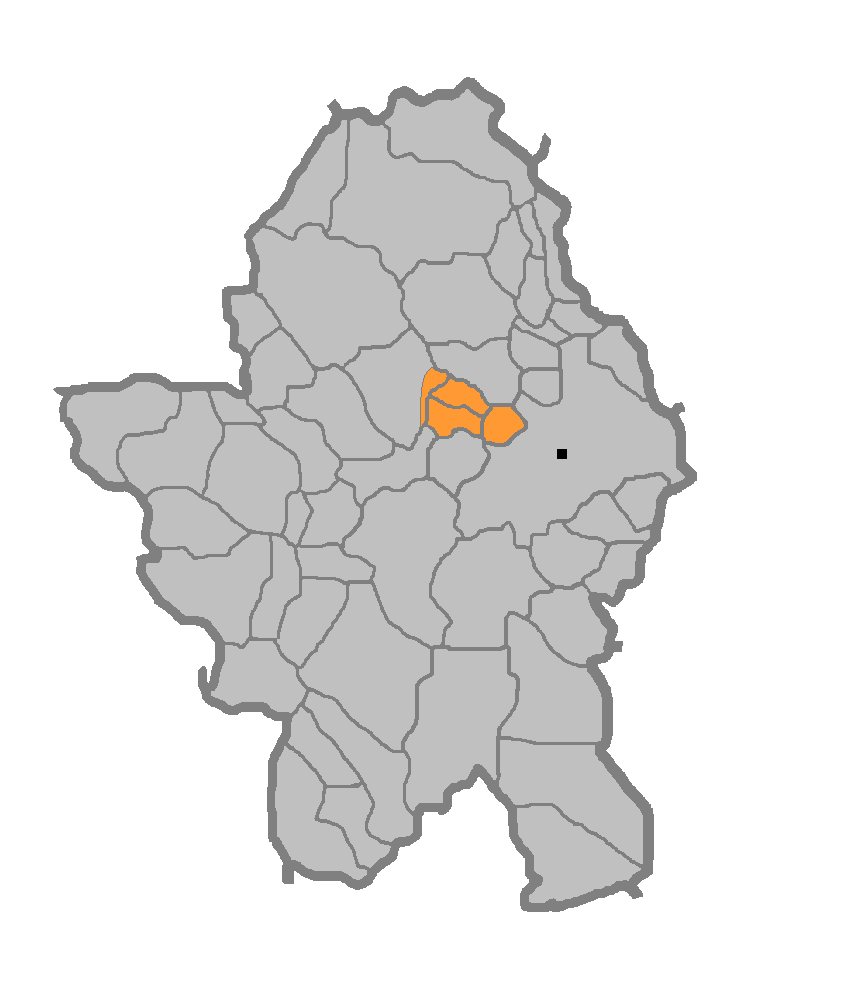 МЗ Сарачица